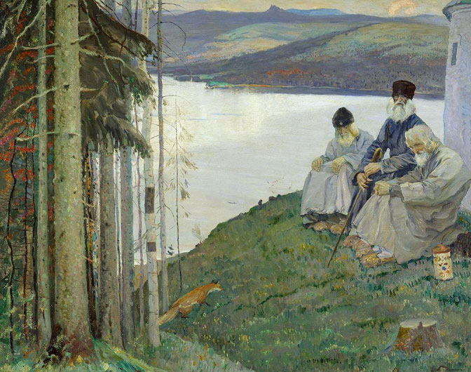 Нестеров Михаил Васильевич. Лисичка. 1914